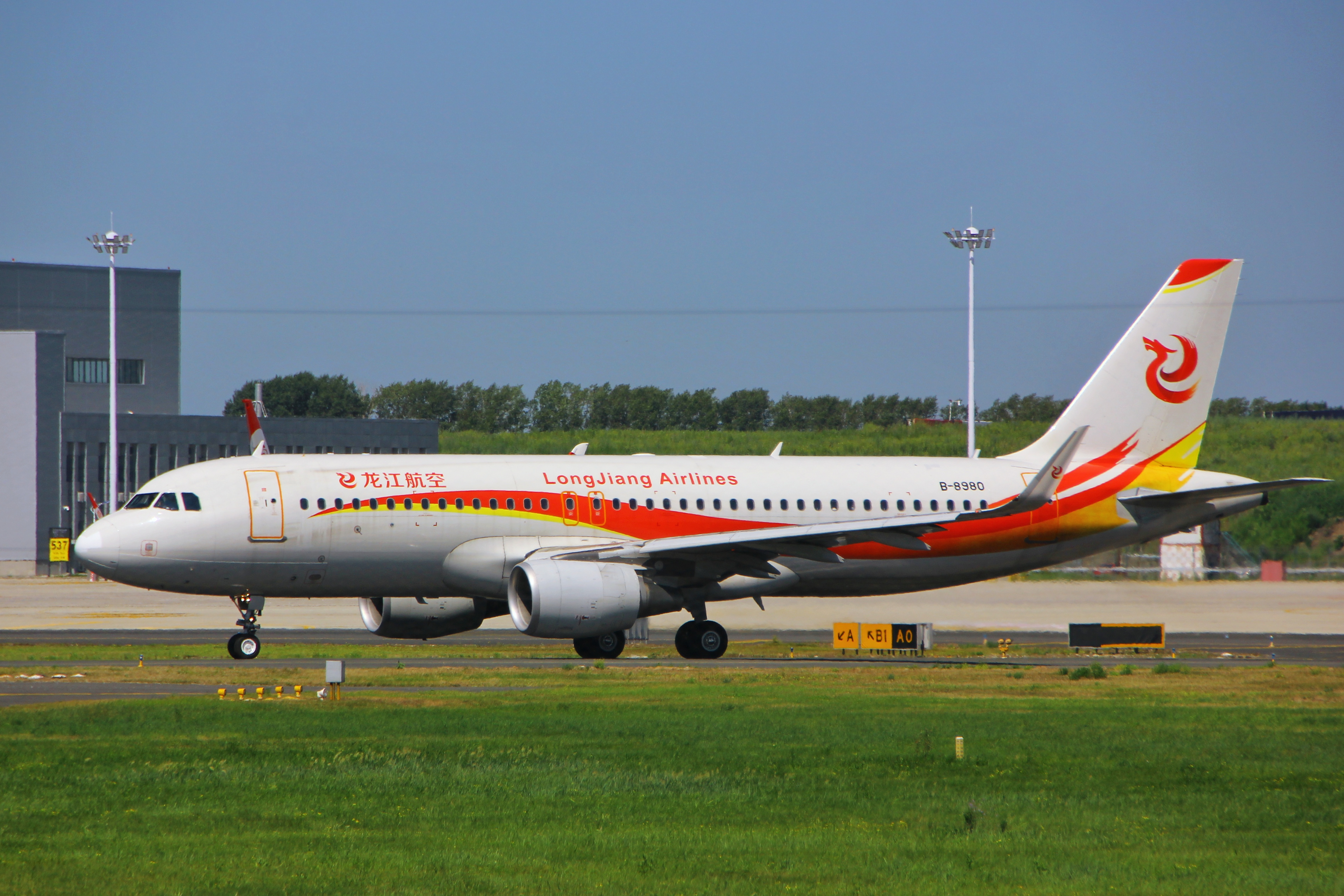 中文（中国大陆）: 龙江航空A320(B-8980)在哈尔滨太平机场